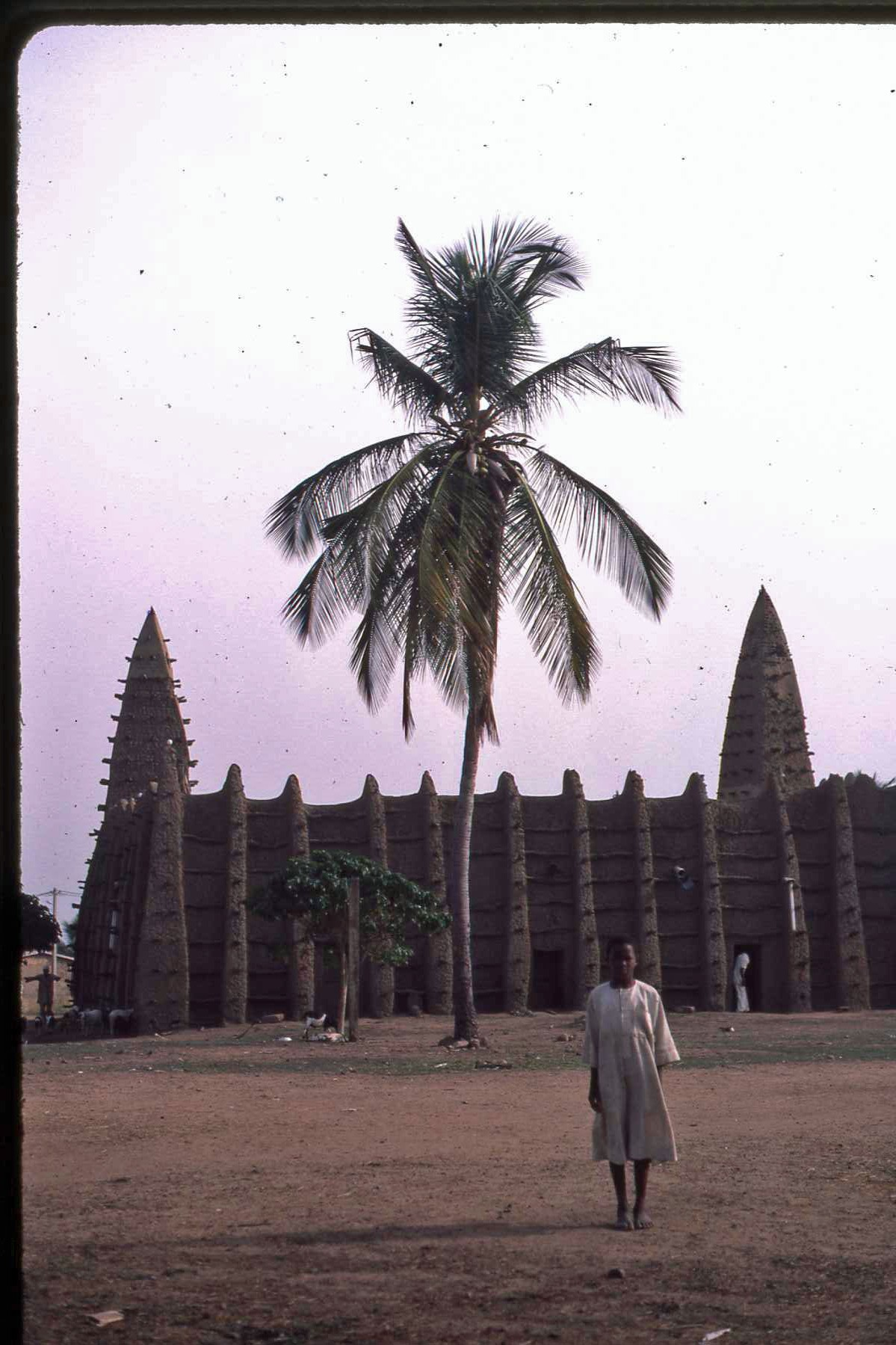 mosquée de Kong